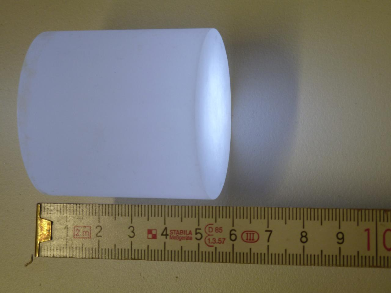 CsI(Tl) Kristall für Szintilatoren mit Skala